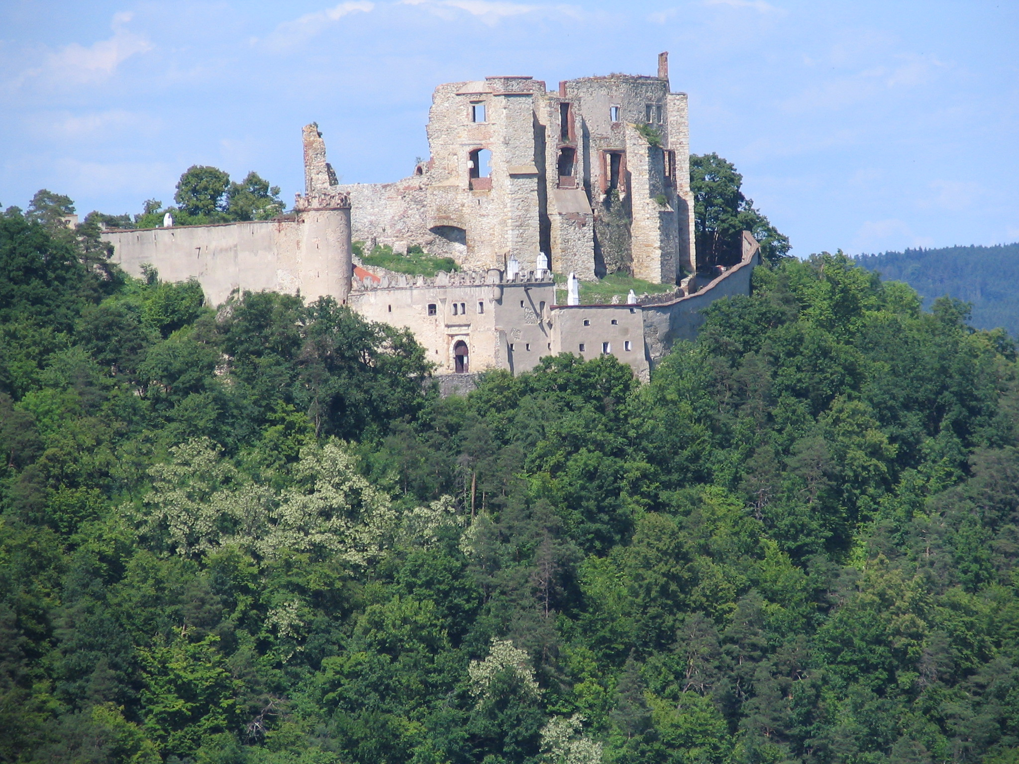 Hrad Boskovice, zřícenina (Boskovice), Hradní 639/7, Boskovice